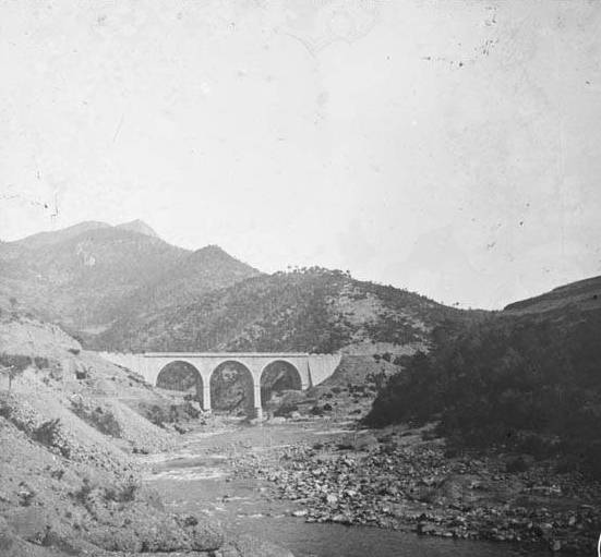 Imatge